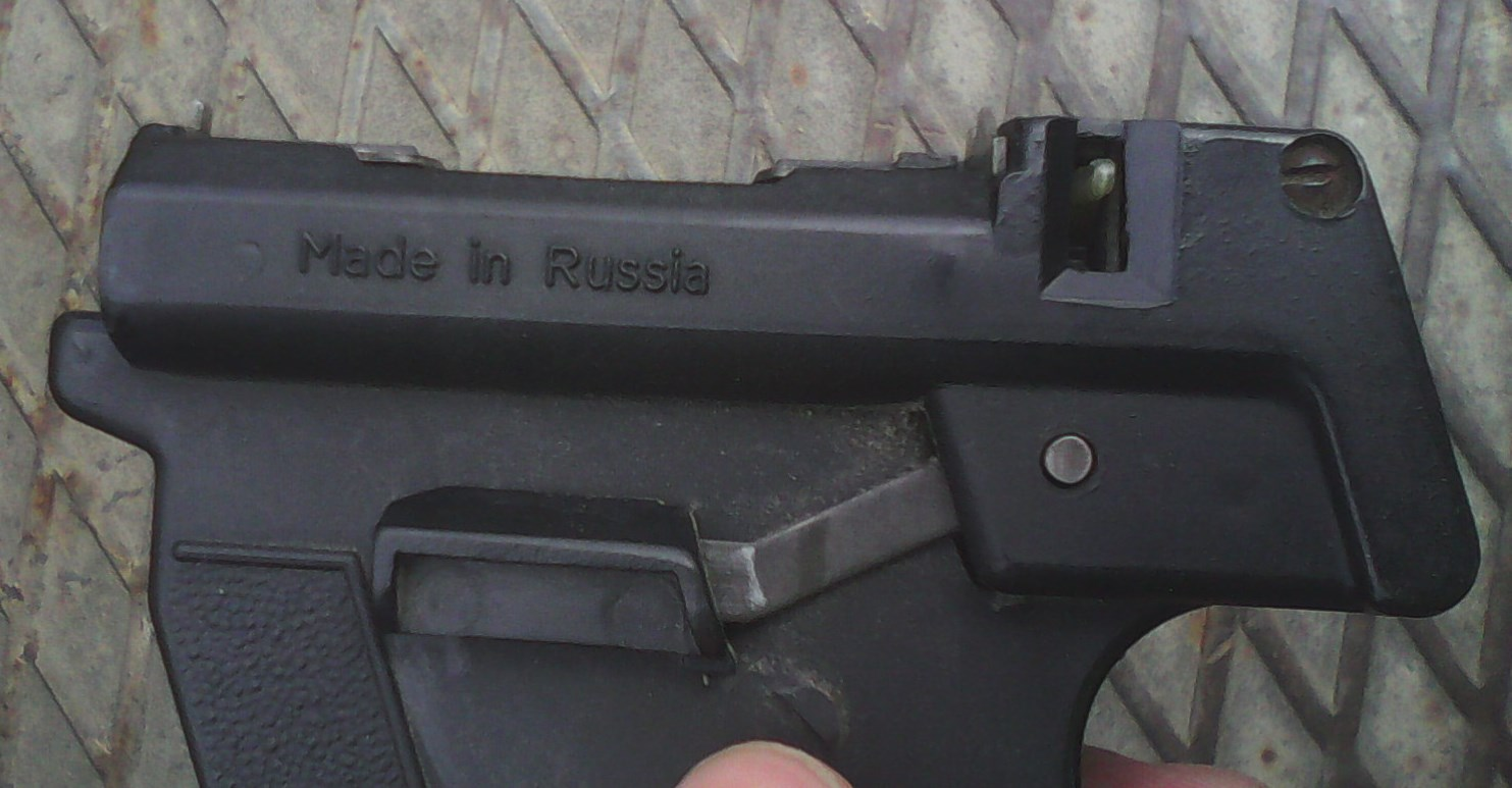 УДАР (устройство дозированного распыления аэрозоля), не снаряжён, снят с предохранителя